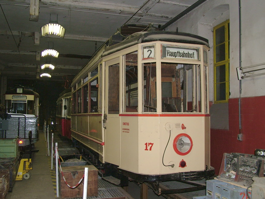 Historic tramcar 17 (built by Lindner in 1928) of the Naumburg tram awaiting its restoration. Der historische Straßenbahnwagen 17 (1928 von Lindner gebaut) wartet im Depot der Naumburger Straßenbahn auf den Abschluß der Restaurierungsarbeiten. picture taken by myself / selbst fotografiert (User:Stefan Kunzmann)